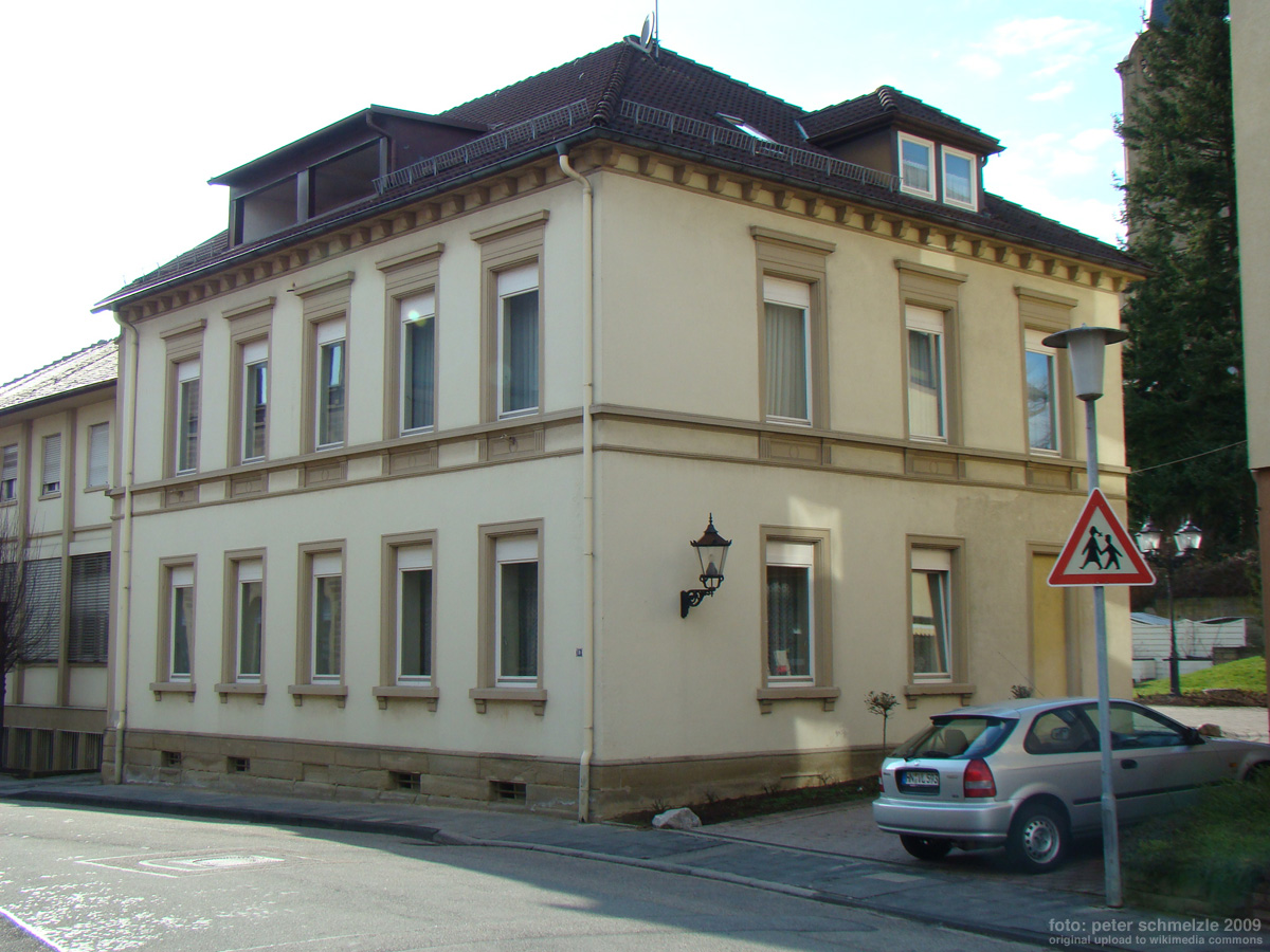 Historisches Gebäude Ludwig-Zorn-Str. 6 in Eppingen